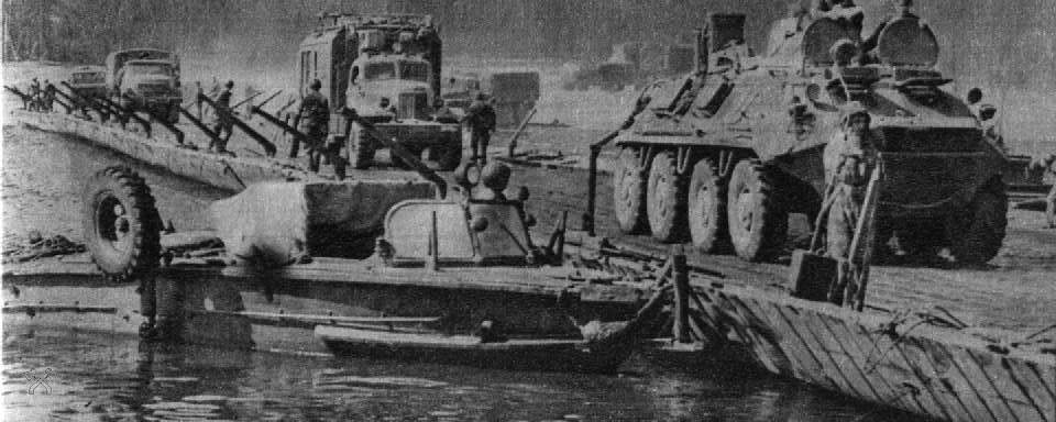 БМК-150